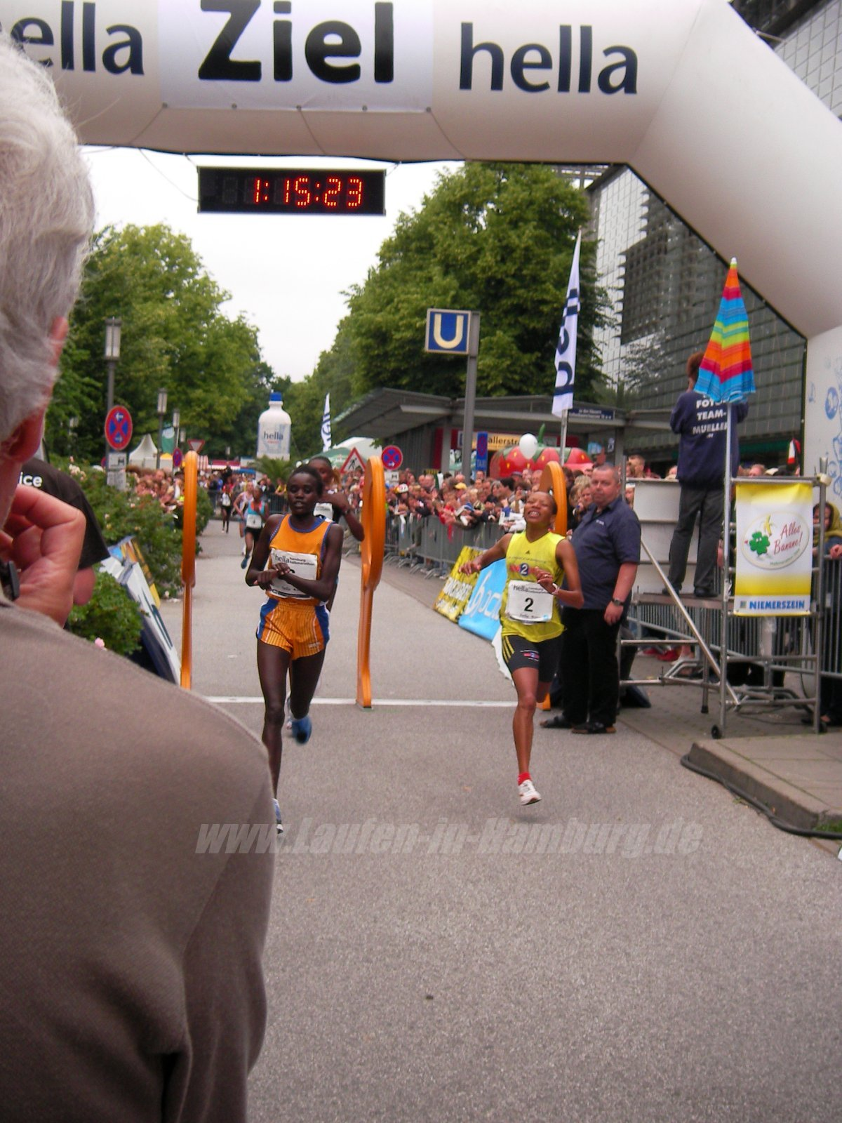 Caroline Chepkwony (links, erste) und Ruth Wanjiru (rechts, zweite), beim hella HM 2009